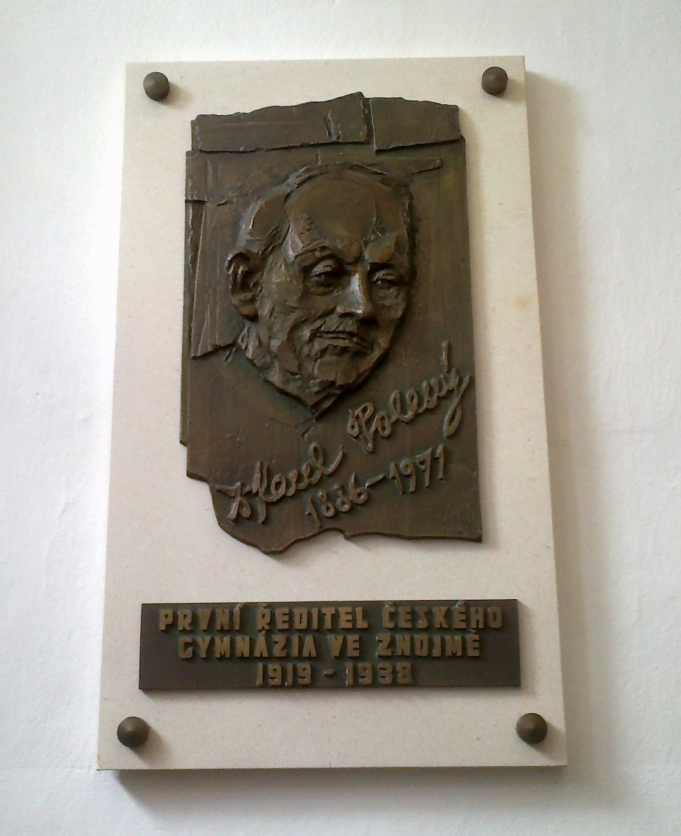 Podobizna Dr. Karla Polesného v budově Gymnázia Dr. Karla Polesného ve Znojmě